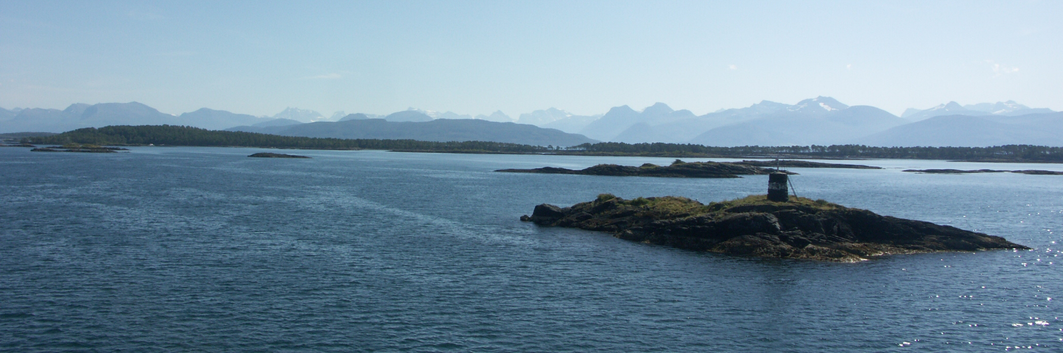 Skerries in Moldefjorden